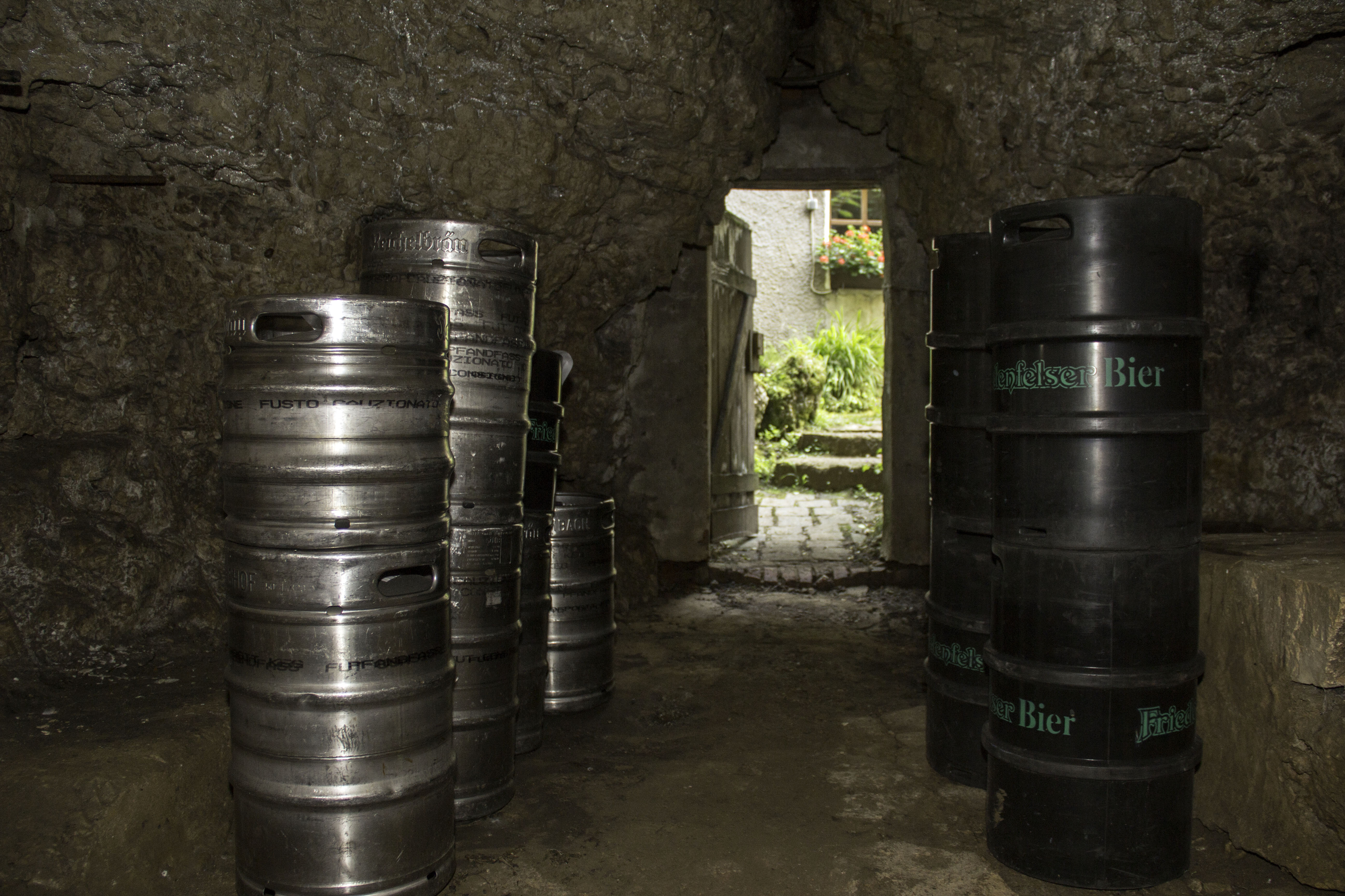 Höhle ohne Namen, Bierlager